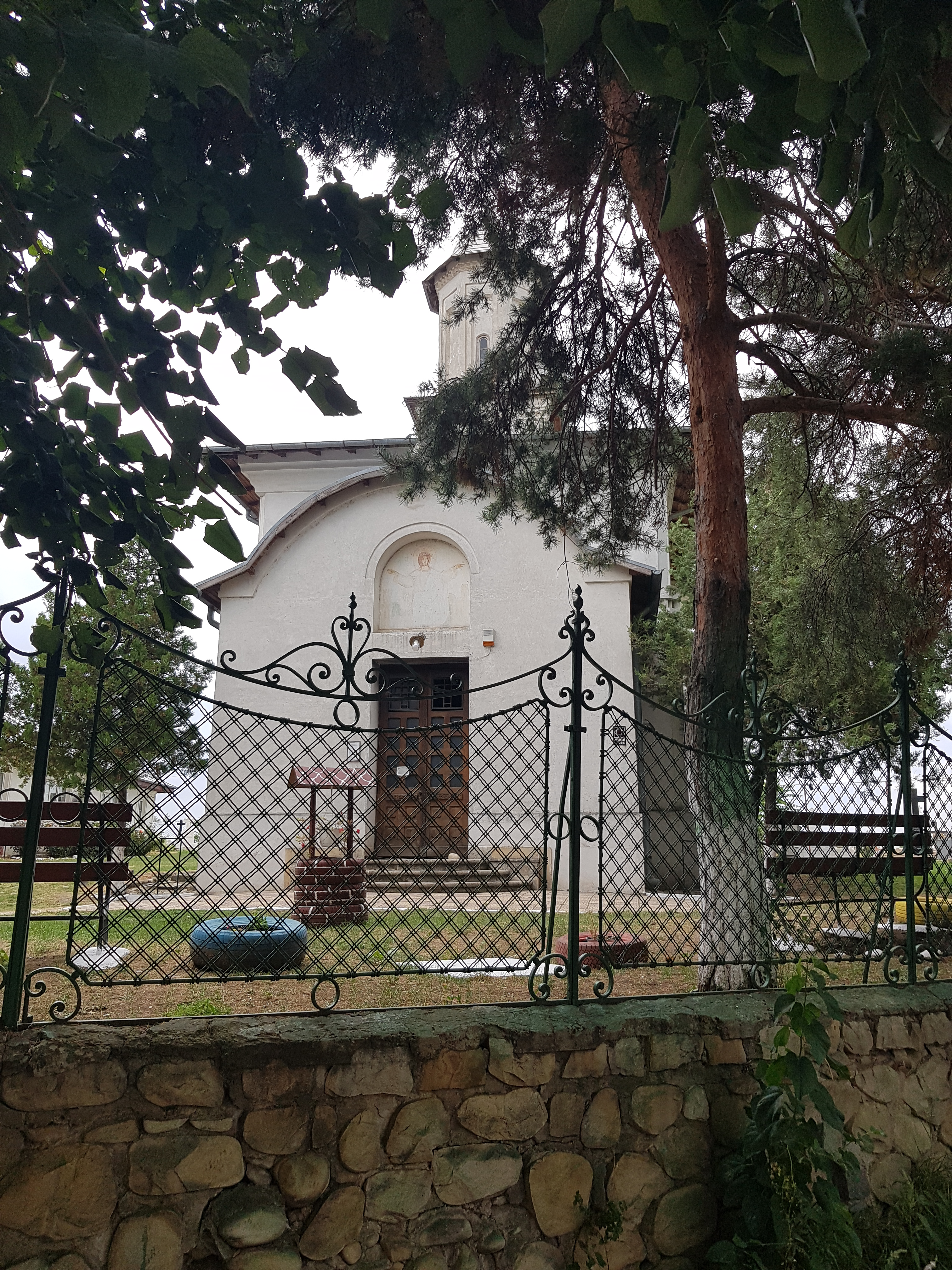 Zid de incintă 03